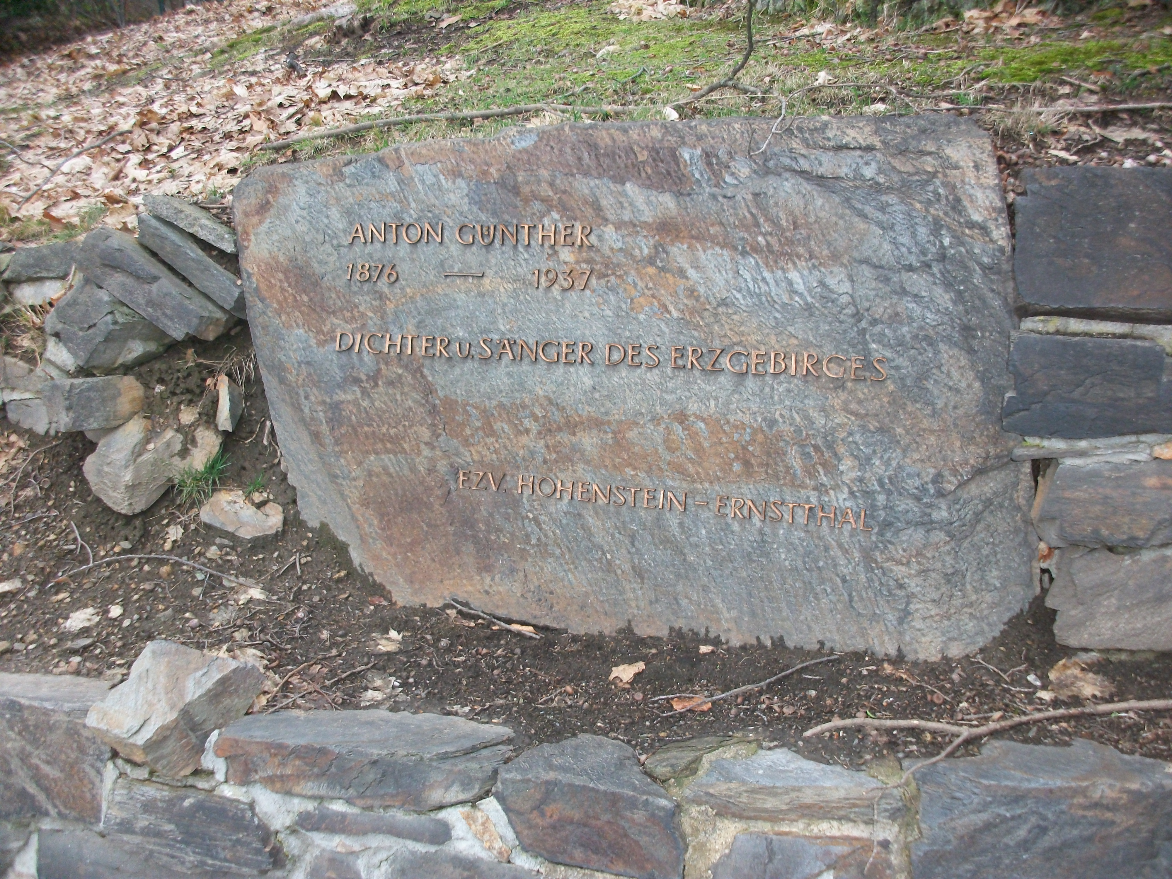 Anton-Günther-Stein in Hohenstein-Ernstthal